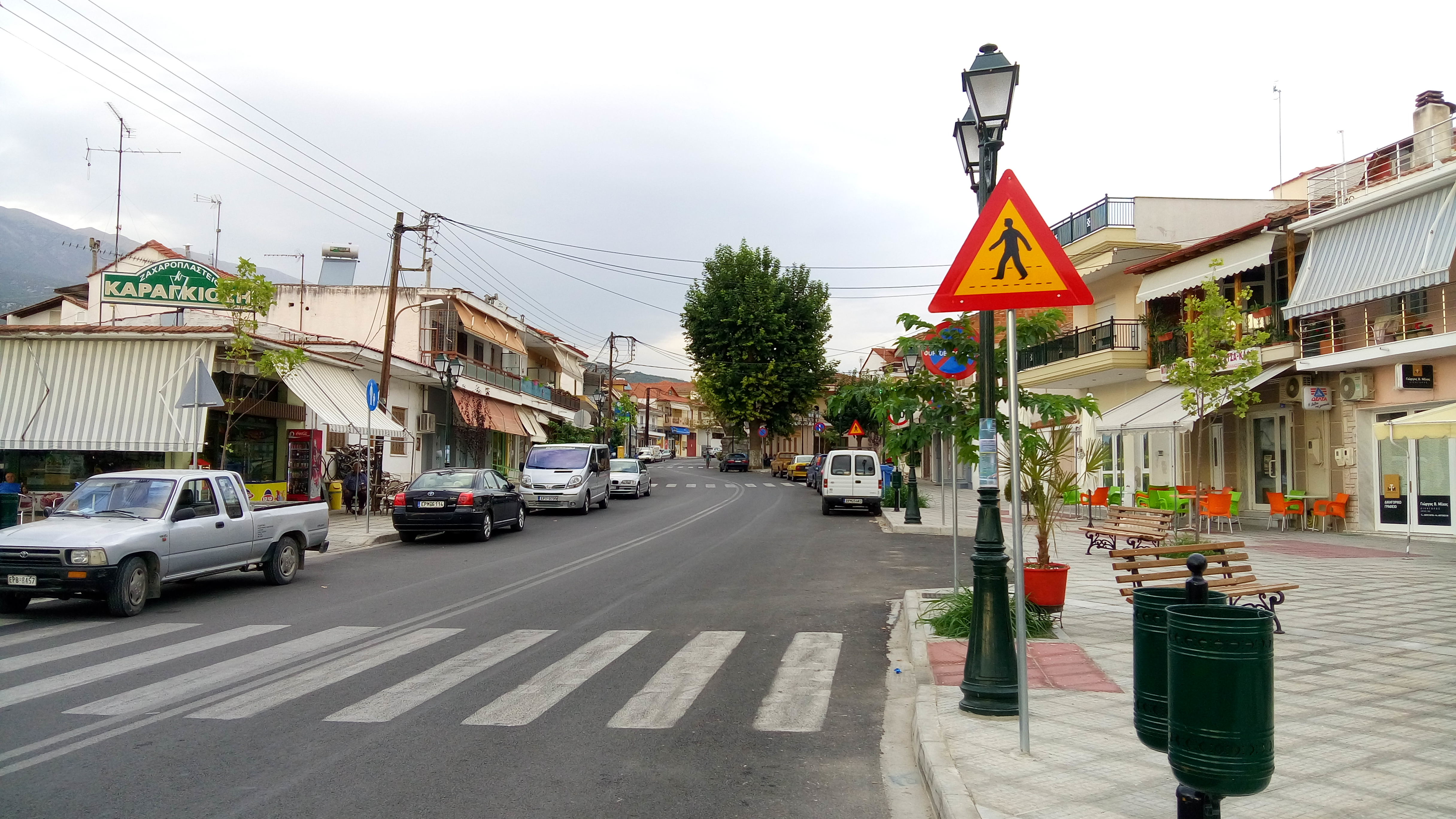 Η κεντρική πλατεία του χωριού μπροστά από το πάρκο του Αγίου Δημητρίου μετά την ανακατασκευή του 2016.